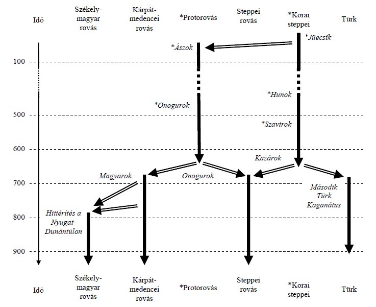 A rovásíráscsaládba tartozó különböző írások (székely-magyar rovás, Kárpát-medencei rovás és steppei rovás) időbeli egymásra hatásának diagramja